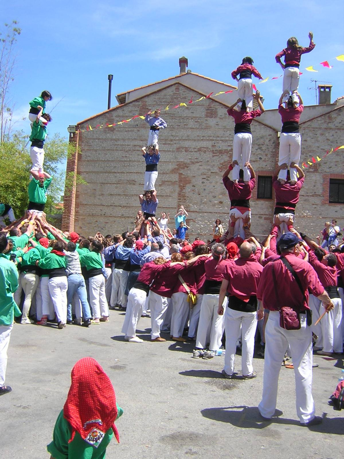 Trobada castellera a Bao (Rosselló), Identi'Cat. En blau els Marrecs de Salt, en verd els Castellers del Riberal i en vermell els Castellers de Lleida.